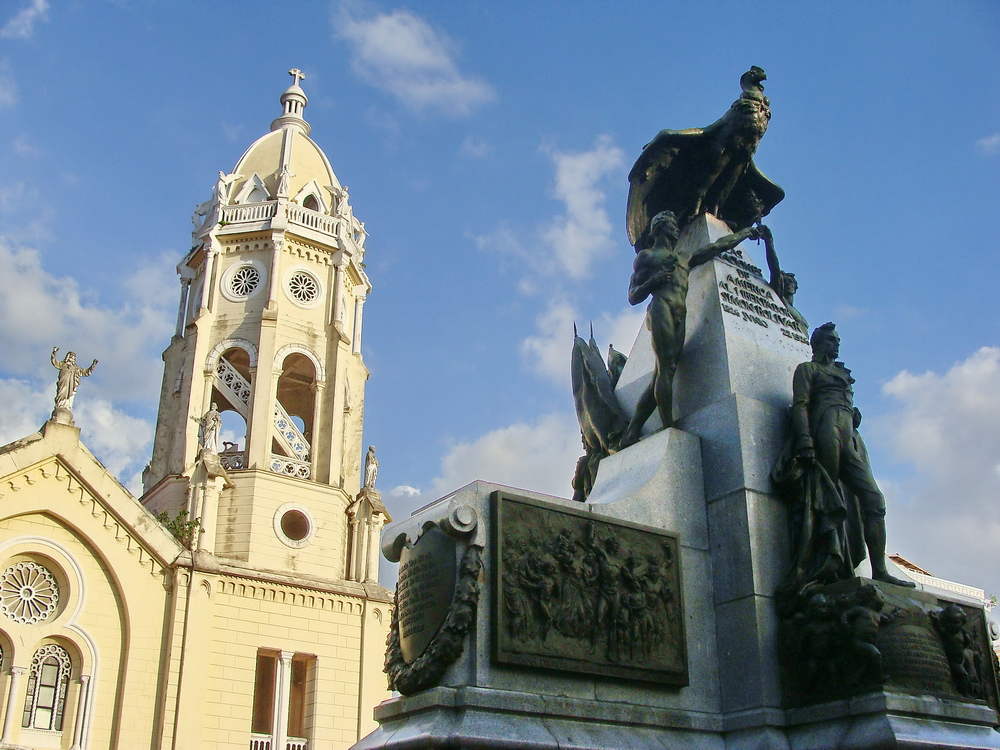 Plaza Bolívar en el Casco Antiguo de Panamá